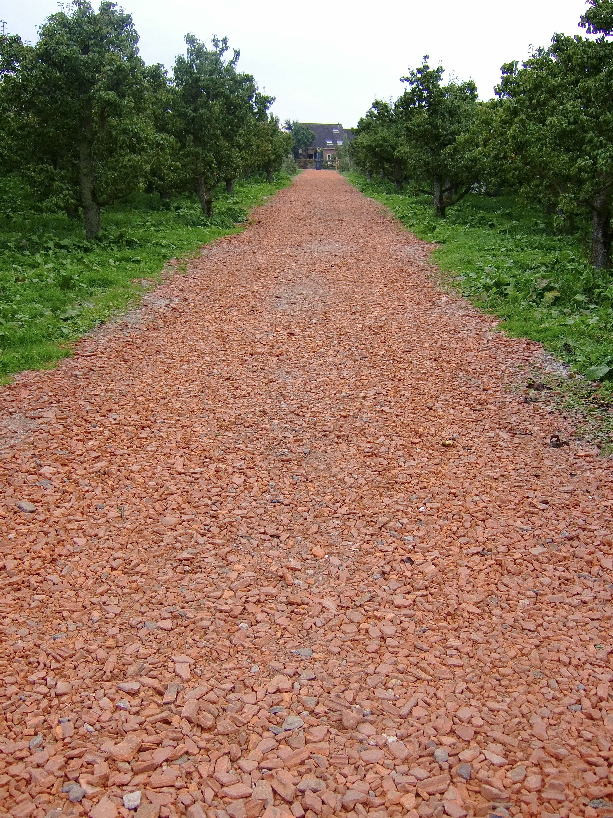 Archeologie/ Utrechts-Gelders rivierengebied: Zicht op gereconstrueerde Romeinse weg Archeoregio 13 (opmerking: Publicatie Uit Balans 2006)